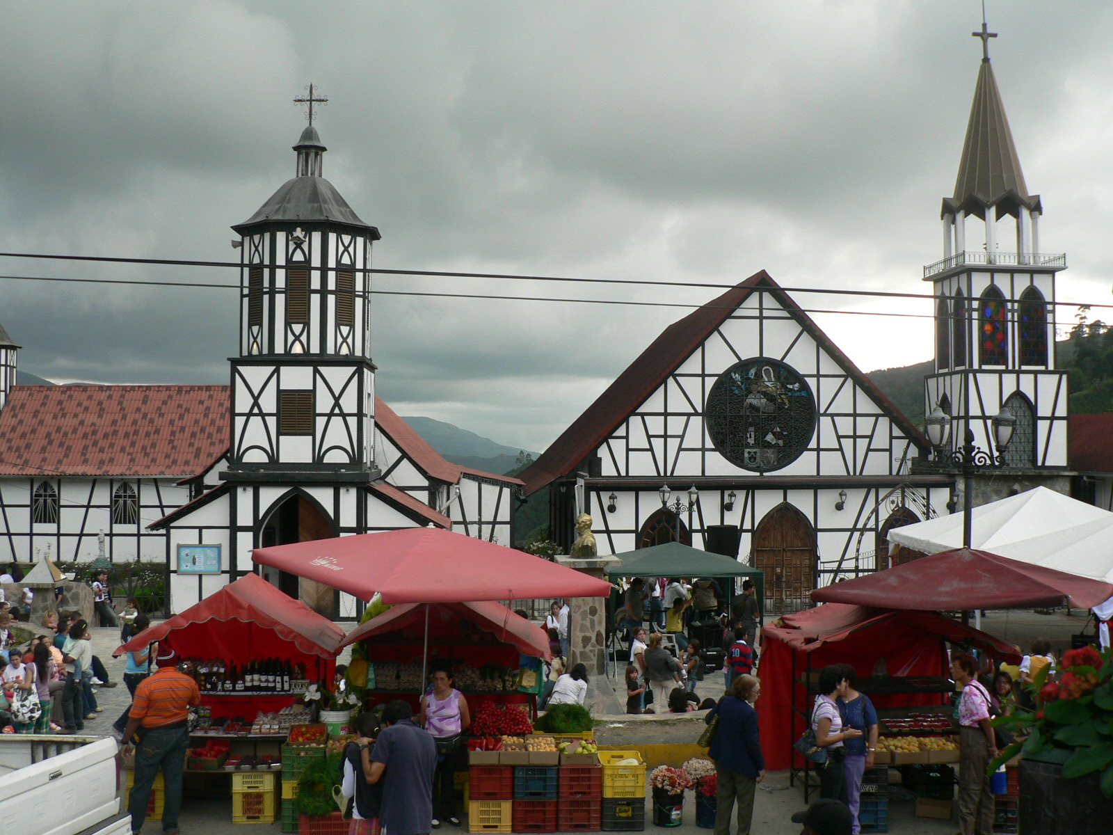 Fotos